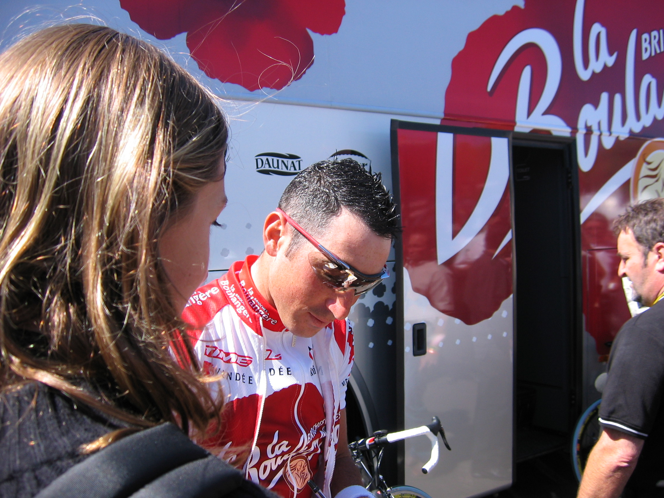 Photo personnelle de Jérôme Pineau pris lors du Tour de France 2004 au départ de Saint Flour. This is a own picture of french cyclist Jérôme Pineau, took on a stage during the 2004 Tour de France